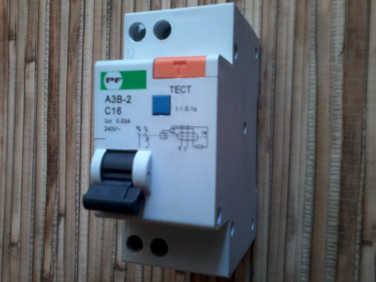 Знято мобілкою Самсунг